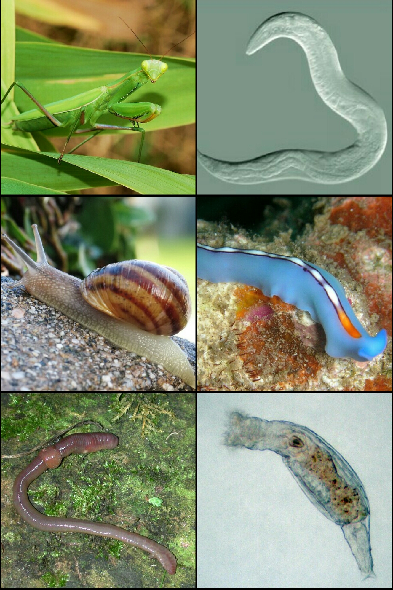 Collage de animales protóstomos basado en imágenes de Commons